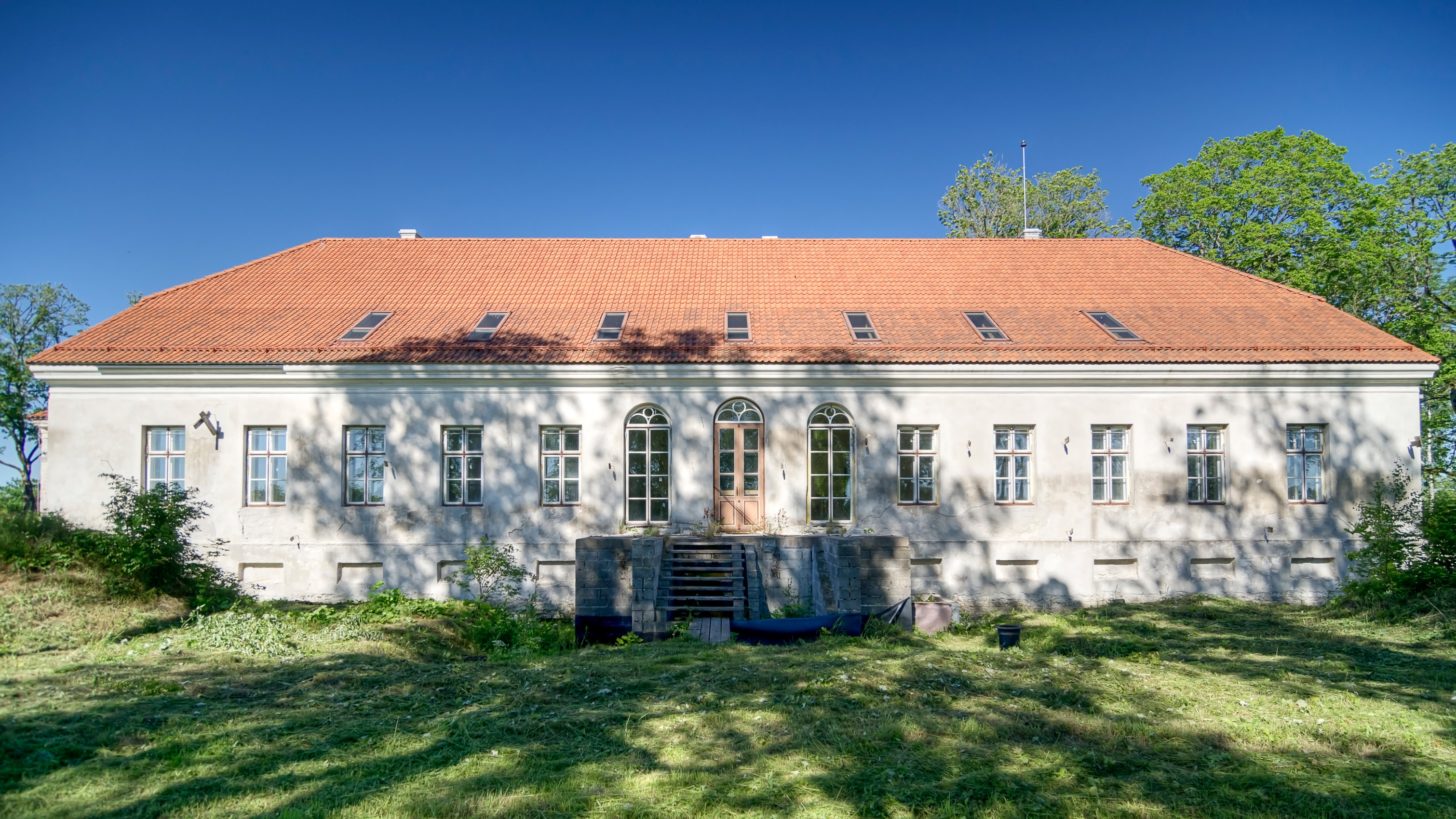 Kõima mõisa peahoone